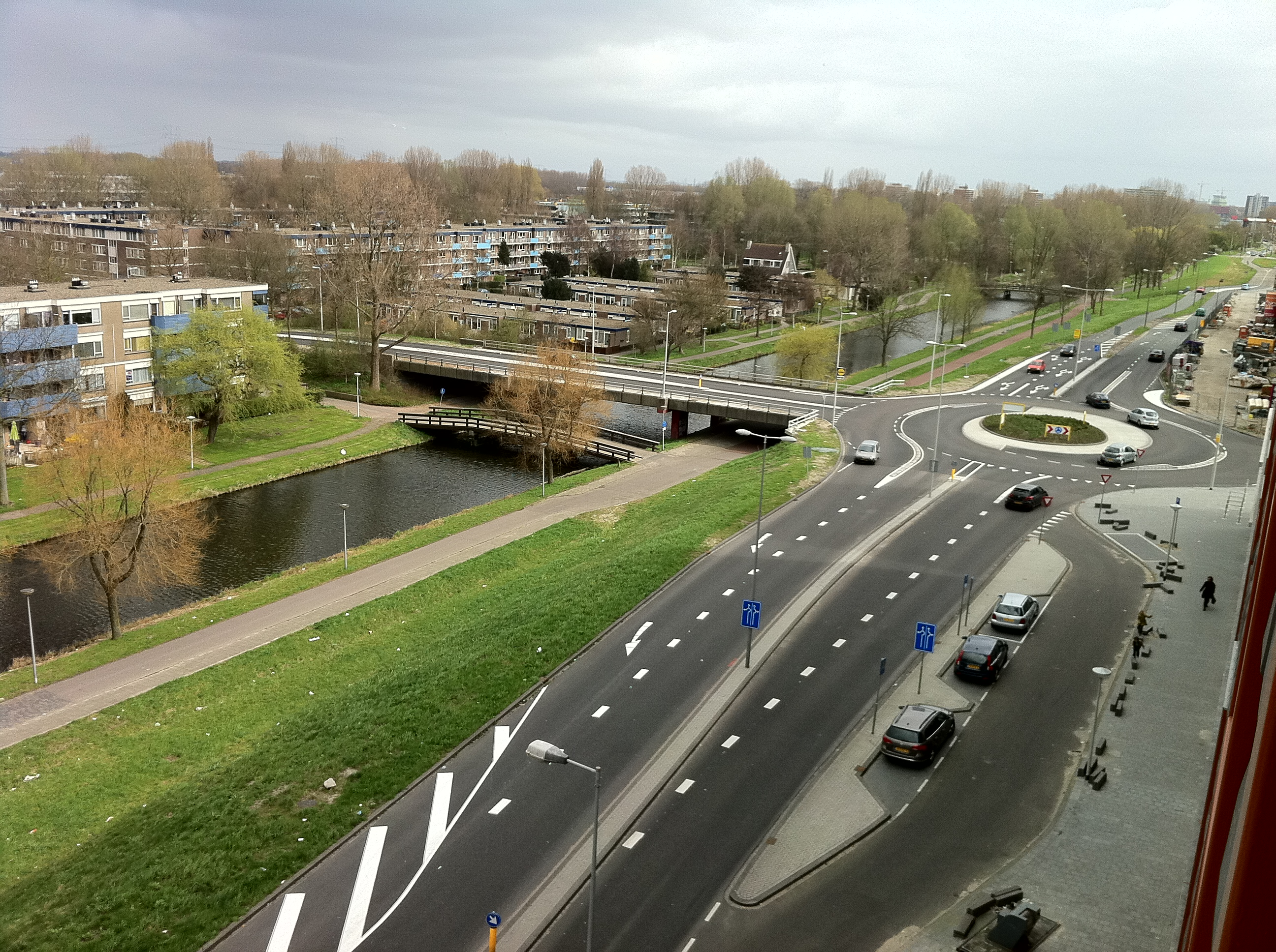 Amsterdam - De Banne. Rotonde IJdoornlaan - Banne Buikslootlaan - Westerlengte